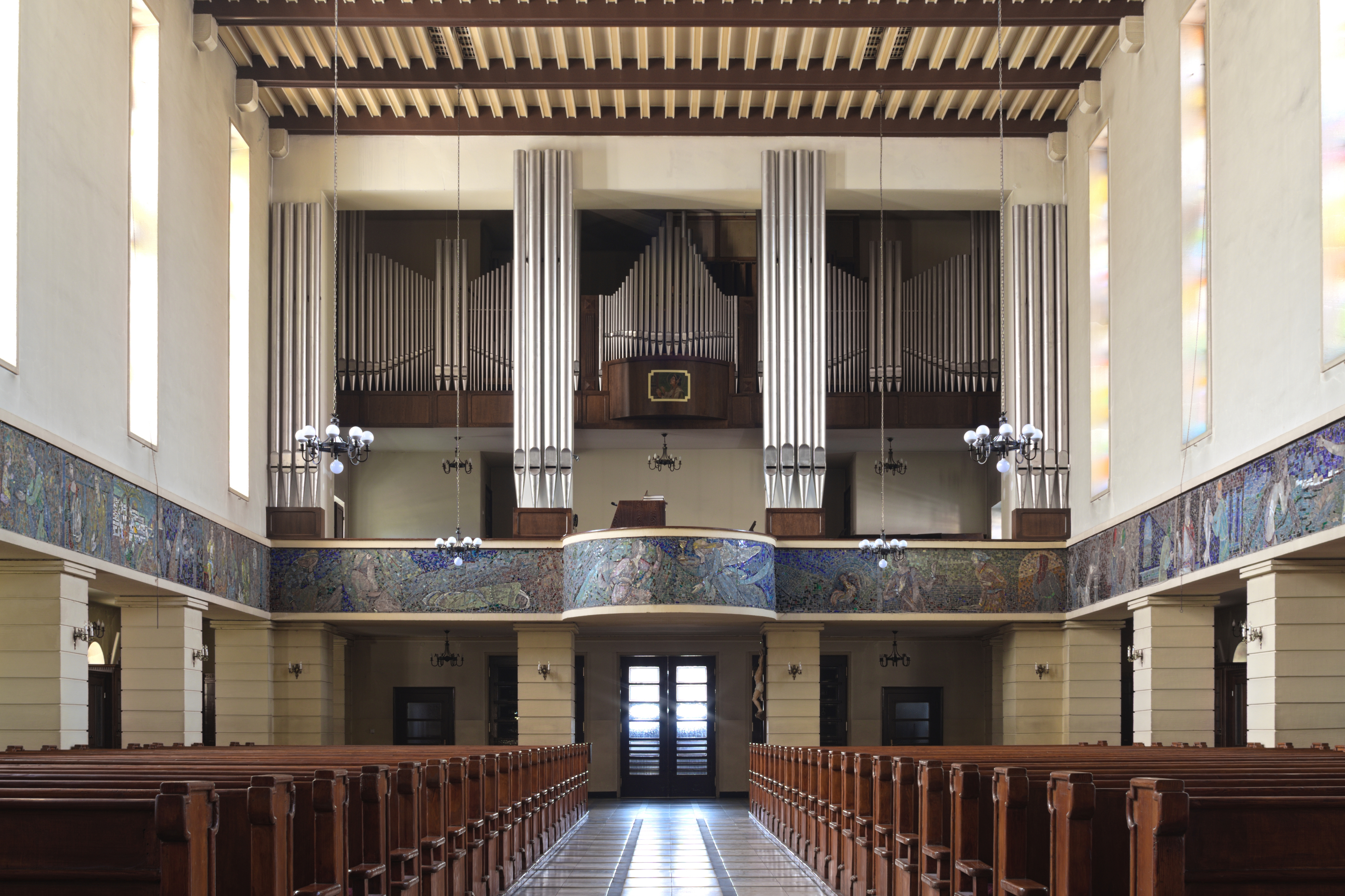 empora i prospekt organowy w nawie głównej kościoła NMP Wspomożenia Wiernych w Gliwicach-Sośnicy; zdjęcie wykonane za zgodą proboszcza tejże parafii, ks. dra Piotra Grzegorzewicza